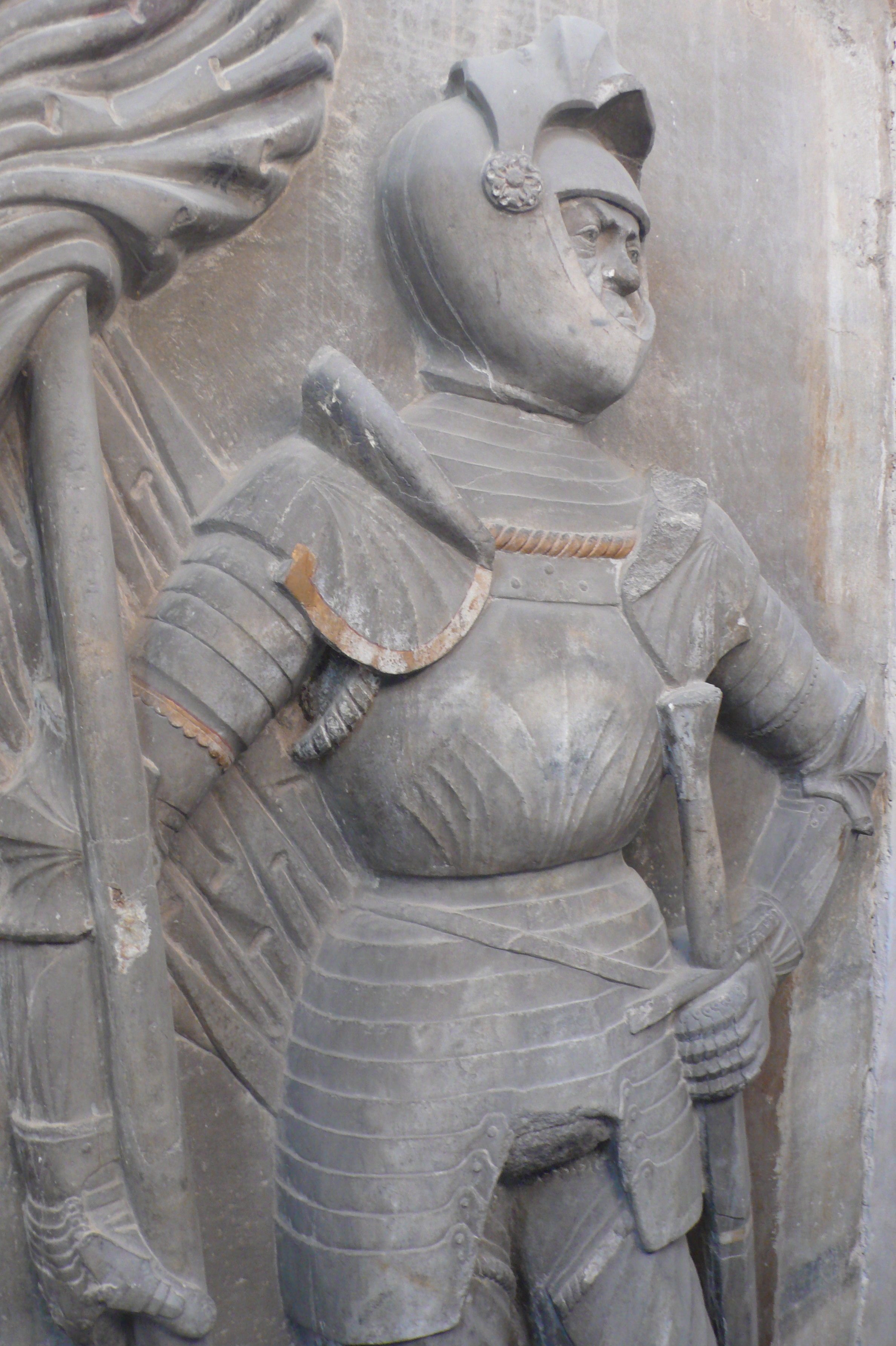 Detail tzv. Lobkowiczského epitafu. Autor: Ulrich Creutz, 1516, klášterní kostel Čtrnácti sv. Pomocníků, Kadaň. Epitaf vytvořen na objednávku Jana II. Hasištejnského z Lobkowicz, který je také na epitafu zobrazen. Tento epitaf spolu s nedalekou tumbou zřejmě tvořil celý náhrobek Jana Hasištejnského (dle Mýtus Ulrich Creutz, str. 184-185).